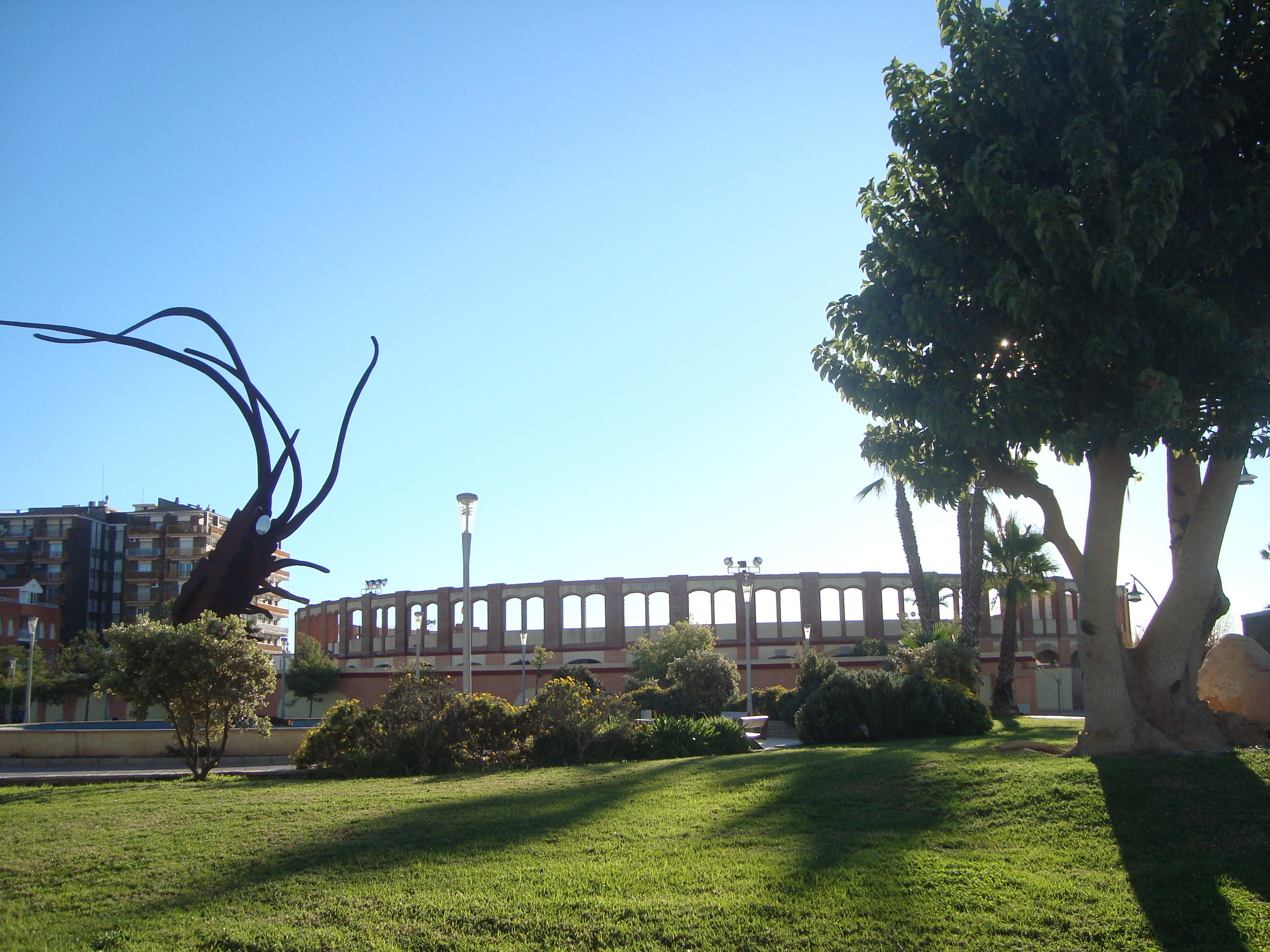 Plaça de Bous (Vinaròs) 03.138-017.